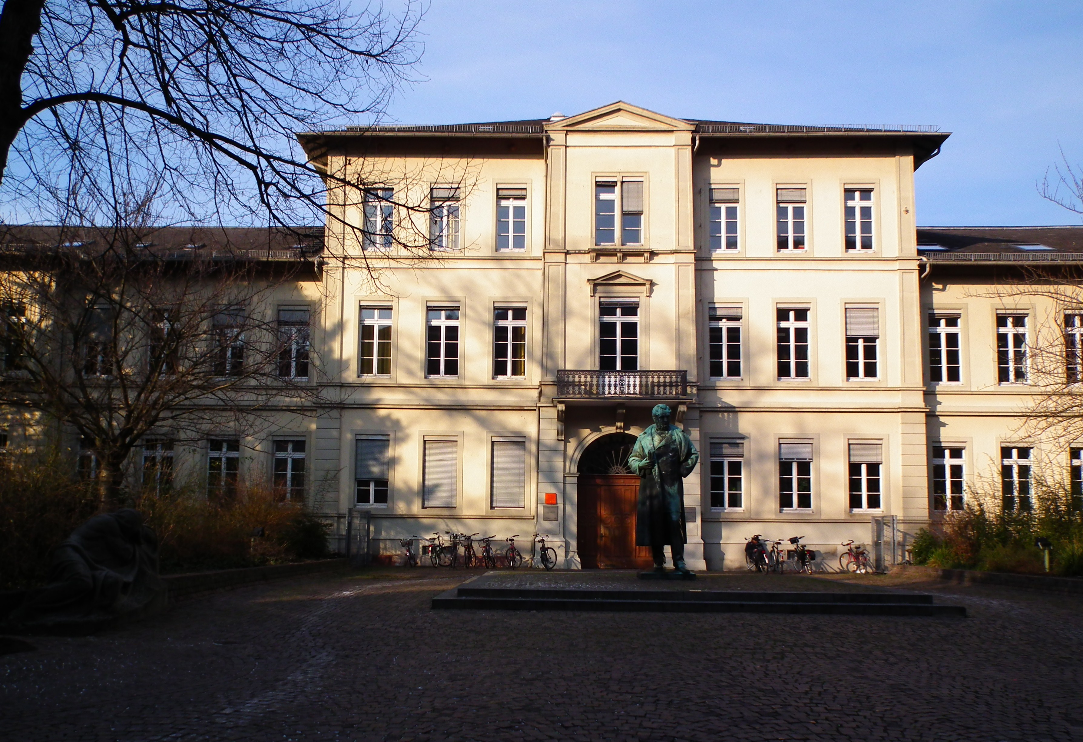 Friedrichsbau in der Heidelberger Altstadt, davor die Statue Robert Bunsens von Hermann Volz (Baden-Württemberg, Deutschland)